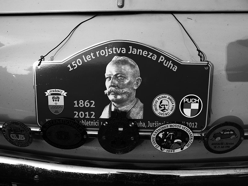 Schild zur Jubiläumsfahrt anläßlich des 150. Geburtstages von Janez Puh/Johann Puch